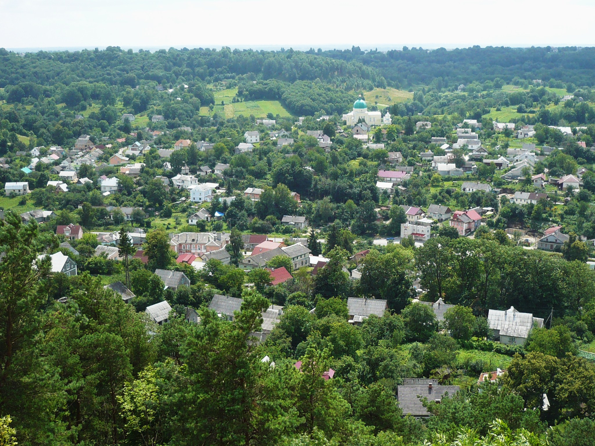 Widok na Krzemieniec